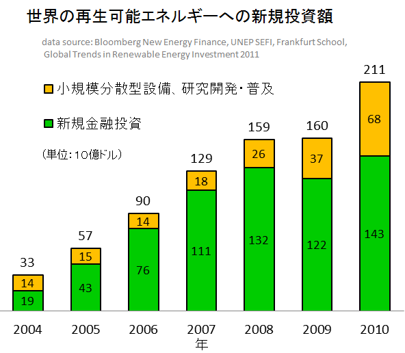 世界の再生可能エネルギーへの投資額 データ出典：Bloomberg New Energy Finance, UNEP SEFI, Frankfurt School, Global Trends in Renewable Energy Investment 2011